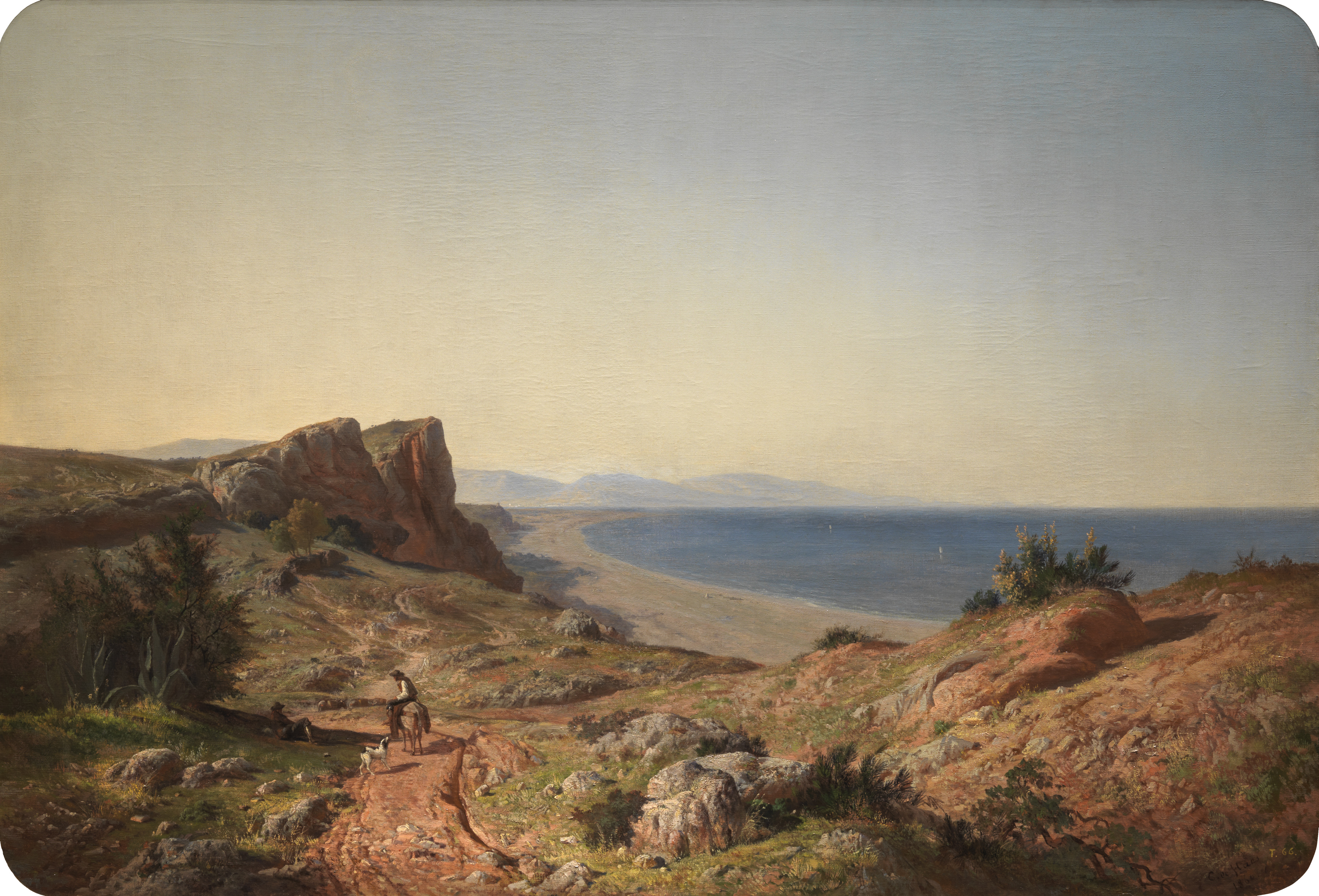 Un paisaje. Recuerdos de Andalucía, costa del Mediterráneo, junto a Torremolinos. Pintura de Carlos de Haes, Museo del Prado.